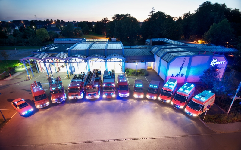 Den Asazzenter Beetebuerg mat den Asazgefierer